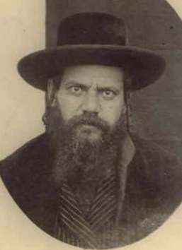 אברהם לייב זילברמן